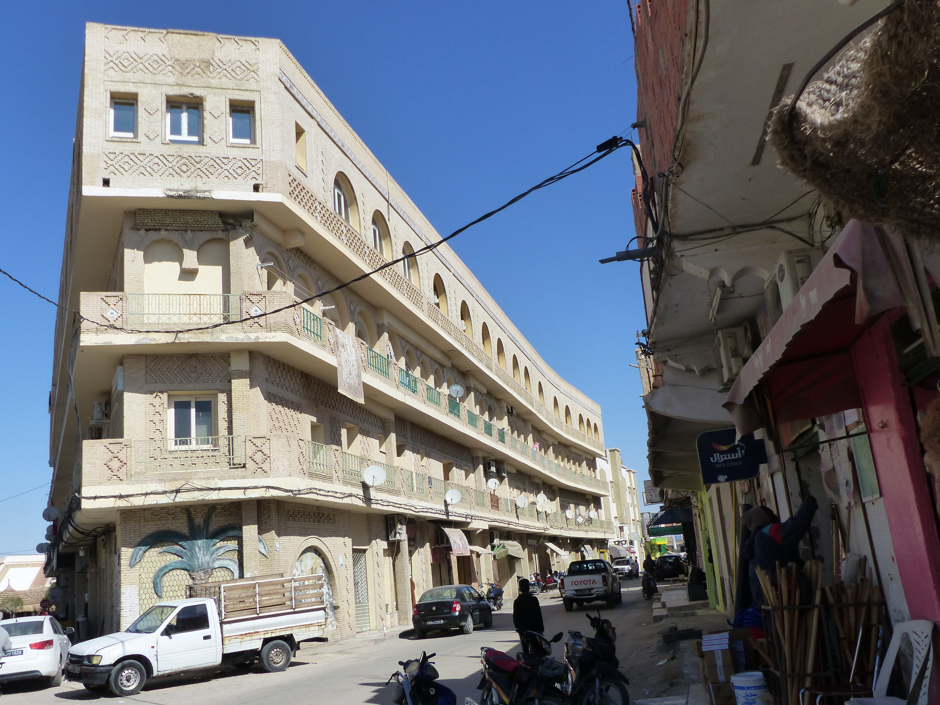 Bâtiment de Tozeur